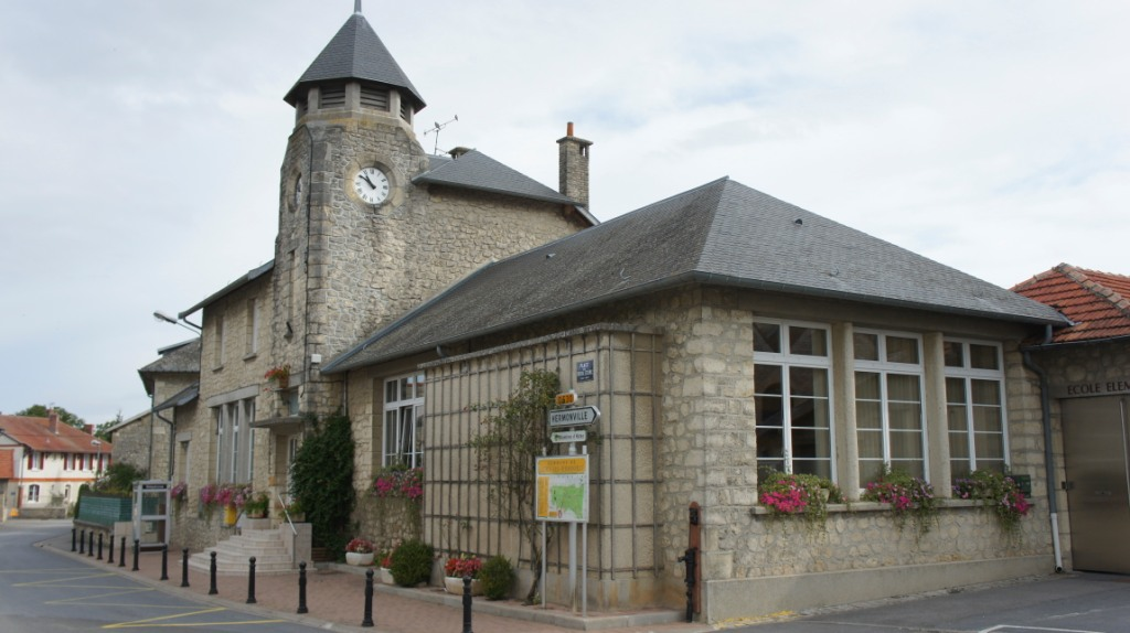 mairie de Cauroy-lès-Hermonville.